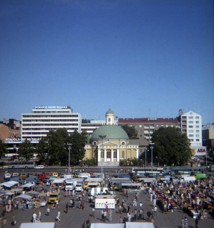 Åbo ortodoxa kyrka, Heliga martyrkejsarinnan Aleksandras kyrka. Motiv: Åbo Kategori: Stadsmiljö, (01) Exteriörer Åbo ortodoxa kyrka, Heliga martyrkejsarinnan Aleksandras kyrka.